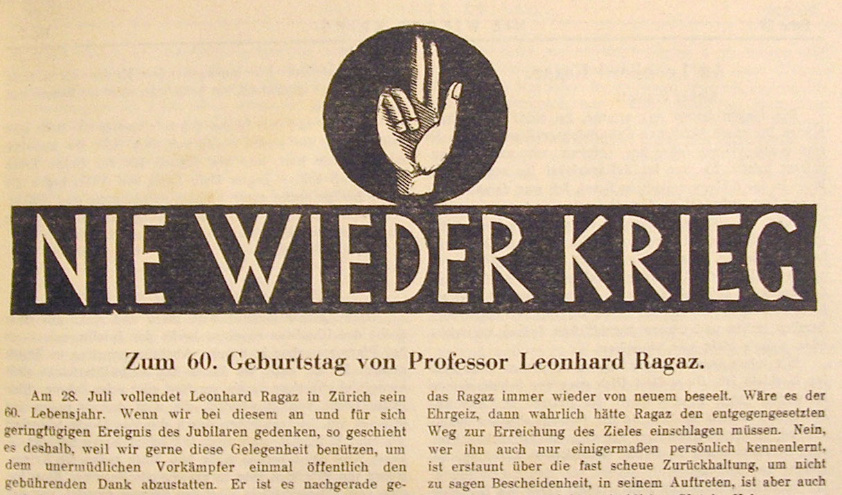 Nie wieder Krieg, Weltfriedensbund der Jugend - Schweizer Zweig, Zürich, No 7 1928. « Zum 60. Geburstag von Professor Leonhard Ragaz »